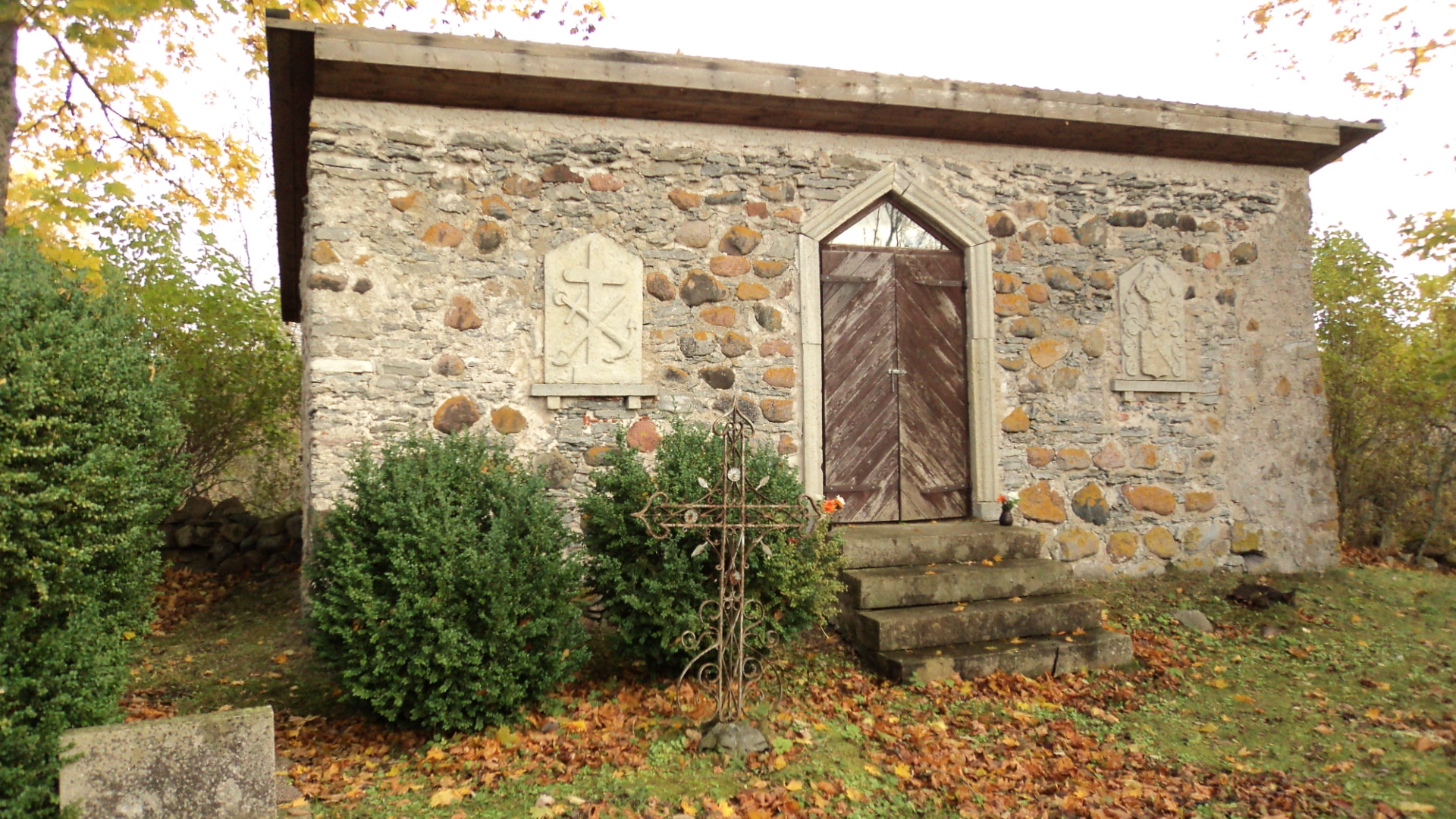 Jämaja kalmistu